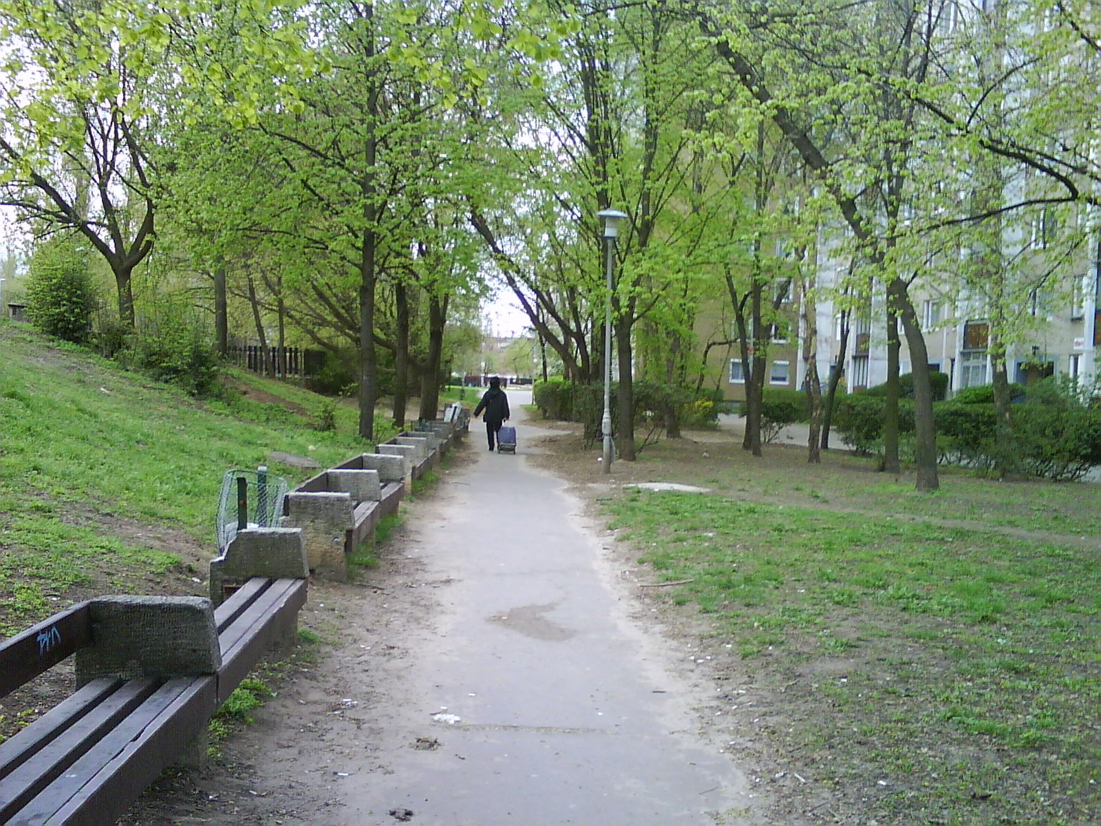 Katalin park